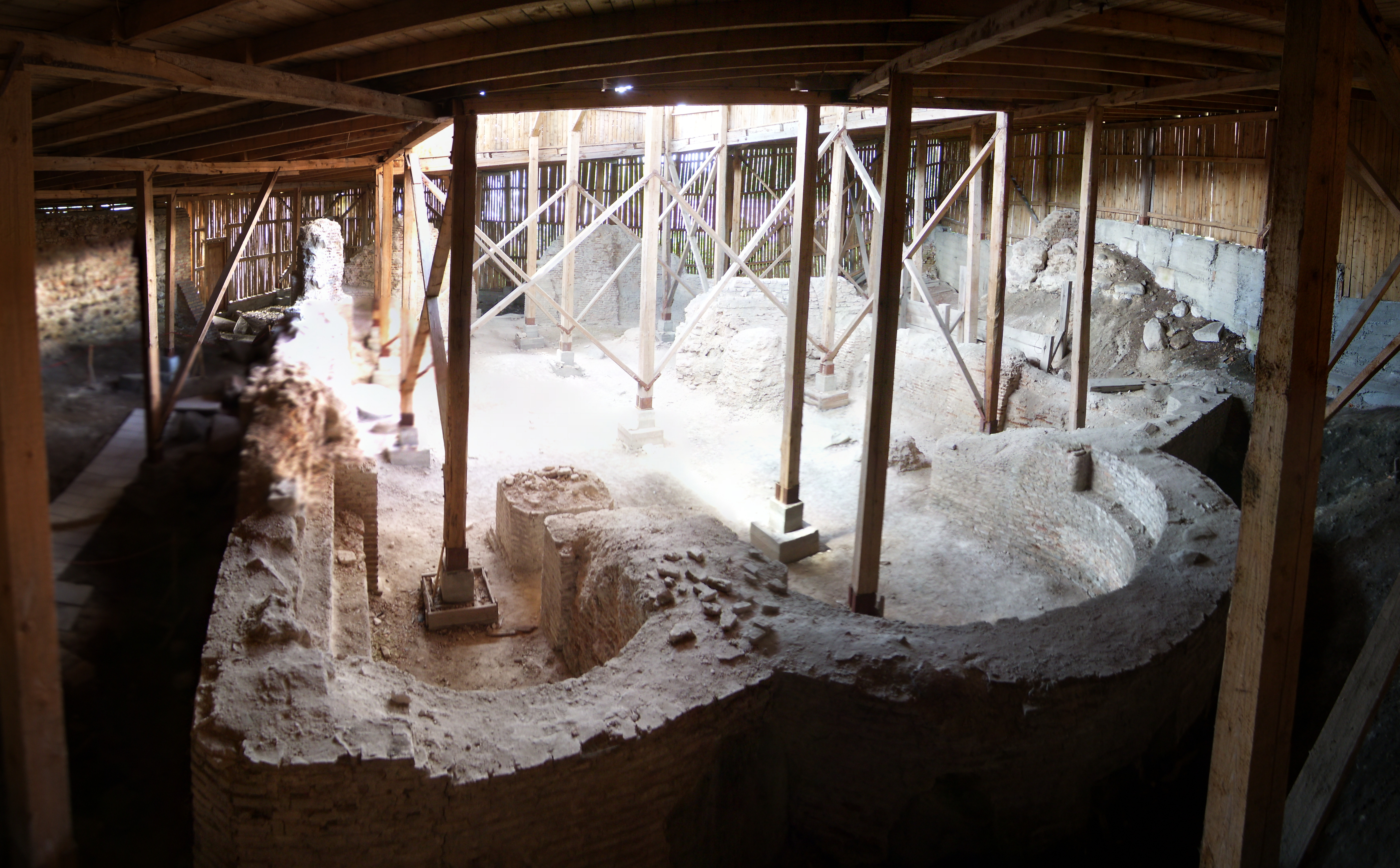 Беларуская (тарашкевіца): Комплекс Старога замка:палацфрагмэнт абарончых сьценНіжняя царква (руіны)Верхняя царква (рэшткі)княжацкі хорам (руіны)мостзамчышча. г. Горадня This is a photo of Belarusian heritage monument. Reference number: 411Г000003 ( WLM)